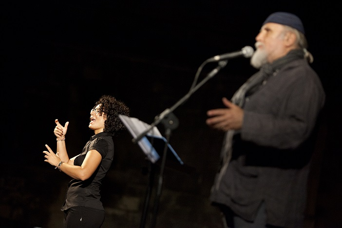 Moni Ovadia al SoundMakers Festival 2013 con inteprete in Lingua dei segni italiana. Autore della foto Diego Panico (Shootalive) per conto di SoundMakers Festival.